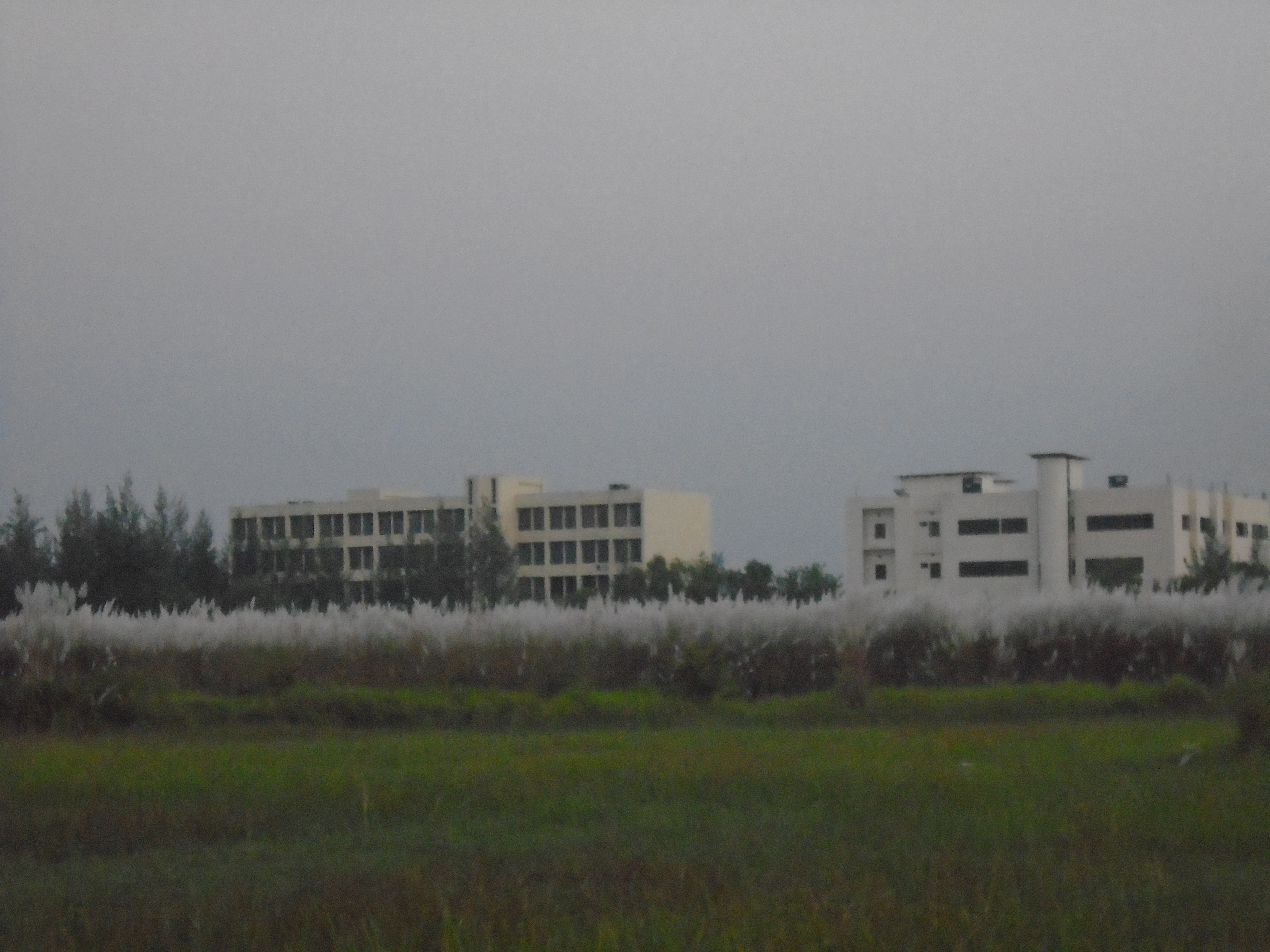 নোয়াখালী বিজ্ঞান ও প্রযুক্তি বিশ্ববিদ্যালয়ের ছোট পরিসীমার এক নজর